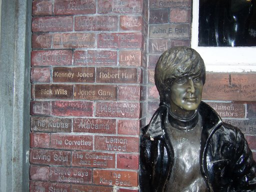 Estatua de Jonh Lennon situada frente el Cavern Club en Liverpool